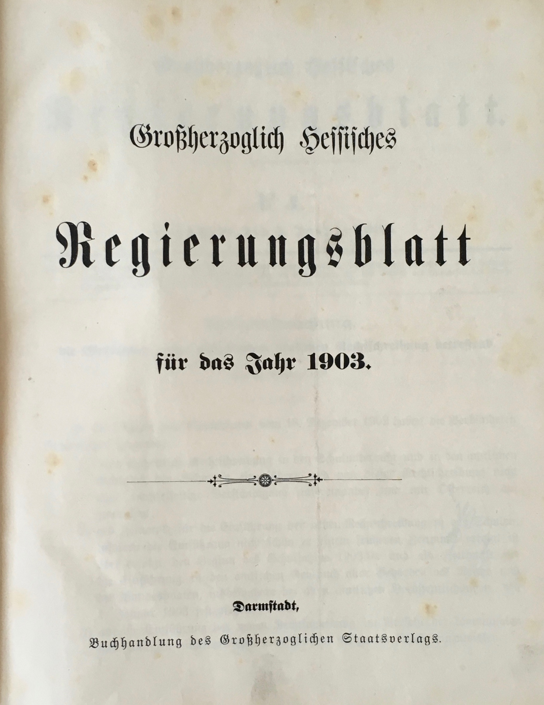 Großherzoglich Hessisches Regierungsblatt für das Jahr 1903, publiziert von der Buchhandlung des Großherzoglichen Staatsverlags